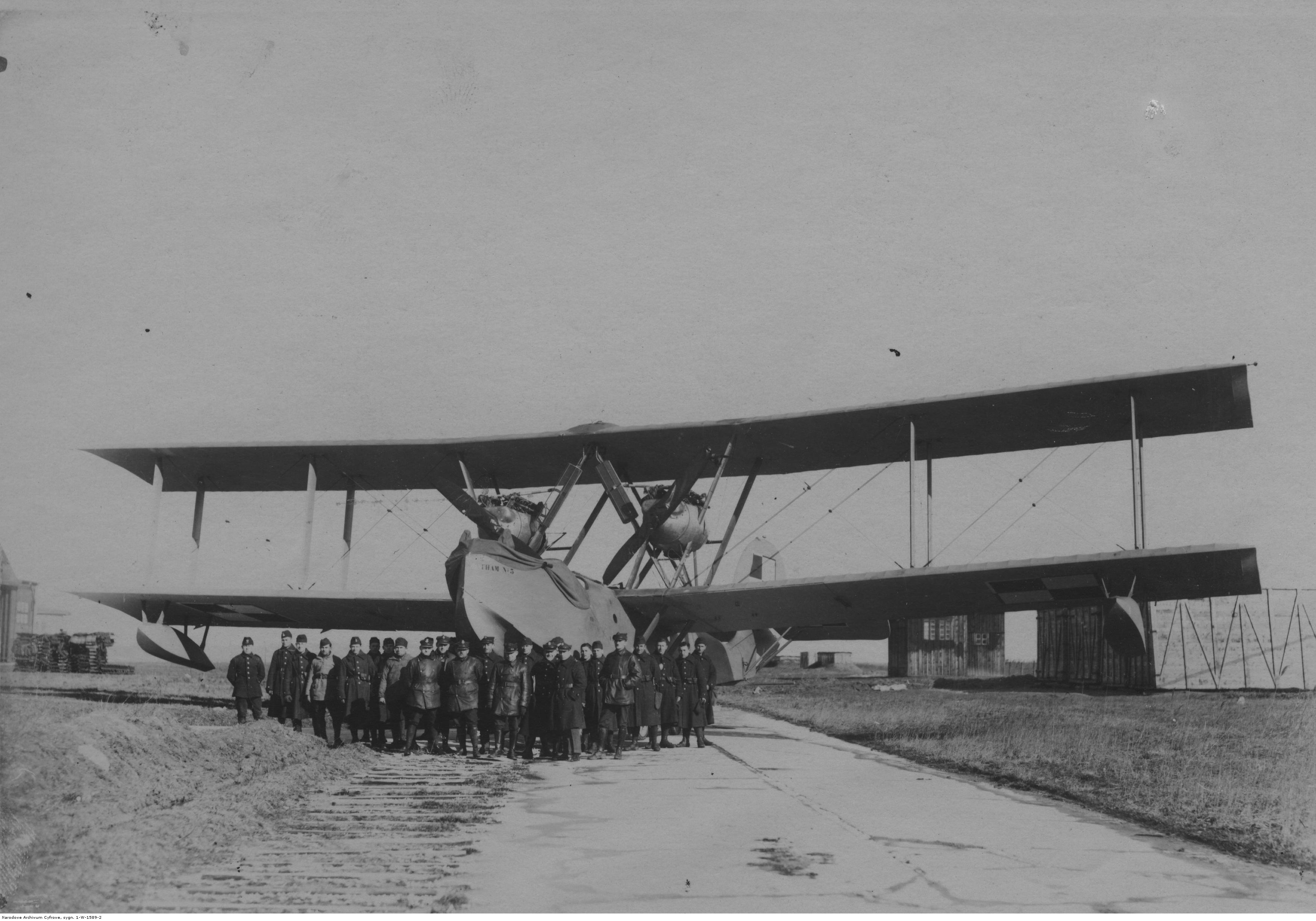 Grupa żołnierzy przy łodzi latającej Latham 43 HB3 Morskiego Dywizjonu Lotniczego.